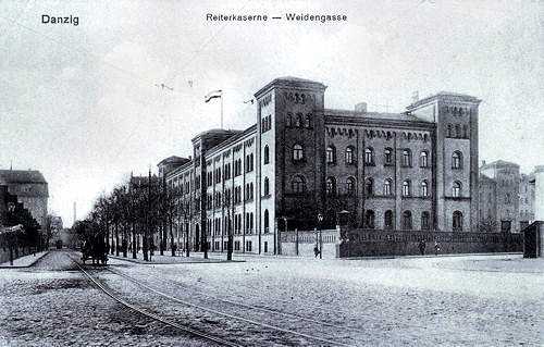 Gdańsk, koszary przy ul. Łąkowej.